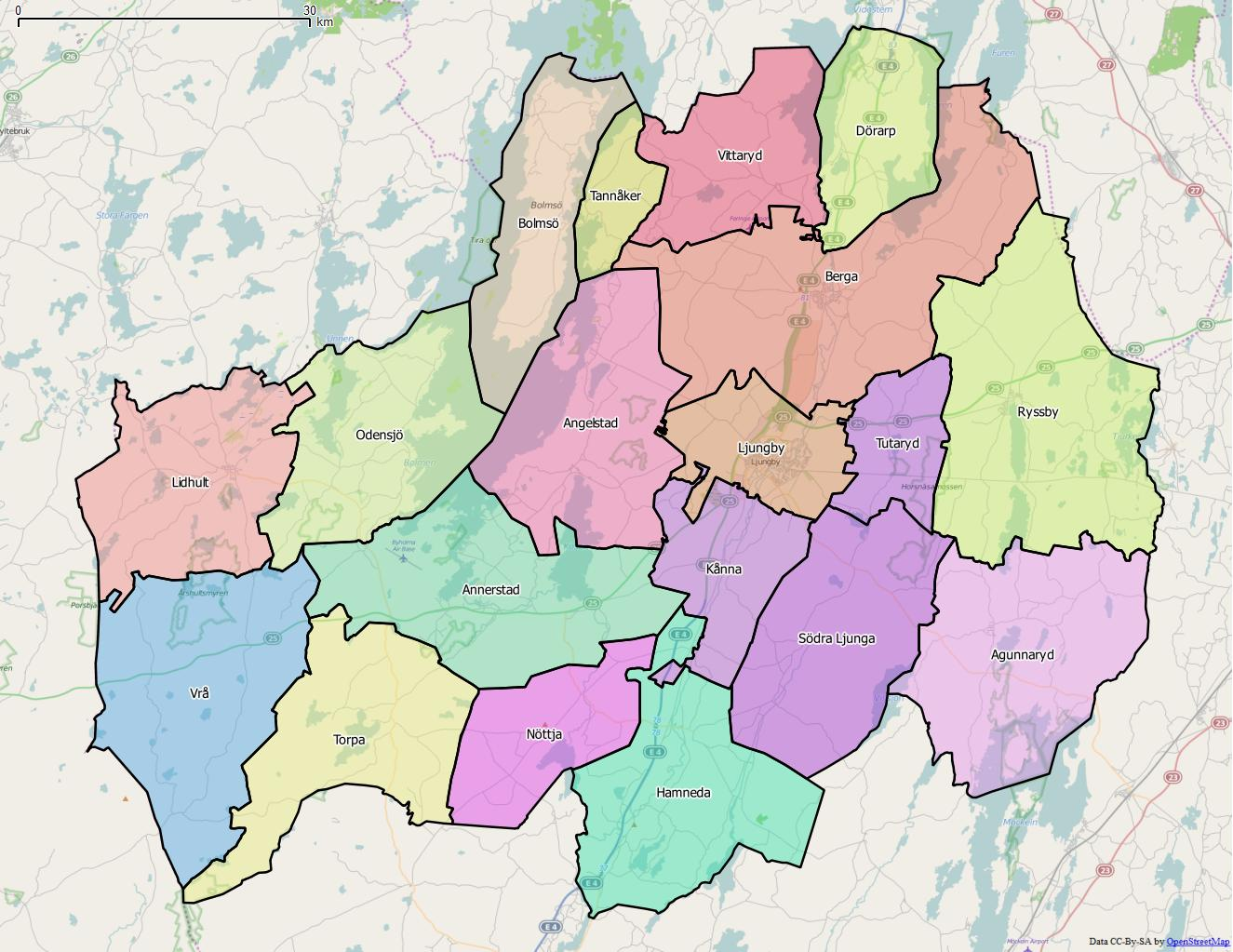 Distriktsindelningen i Ljungby kommun World file: 95.71817367845820002 0 0 -95.71817367845820002 1472593.78962806542403996 7773389.50739165954291821